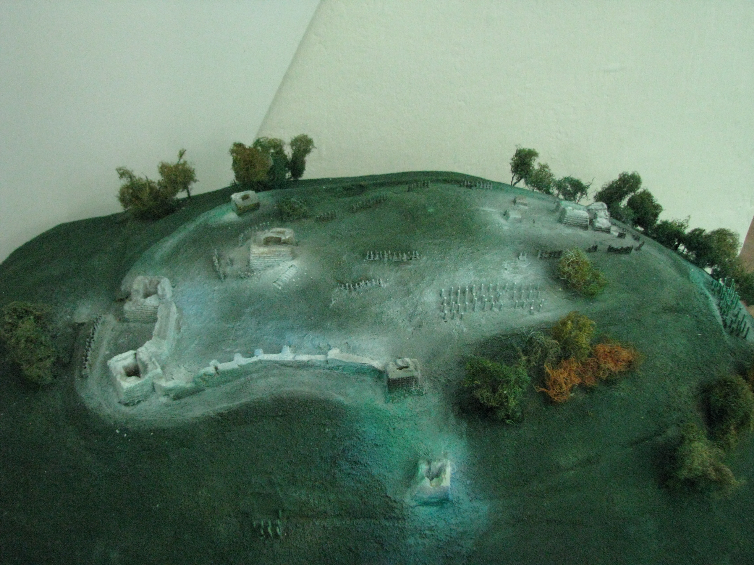 Orăştie Ethnography Museum 2011